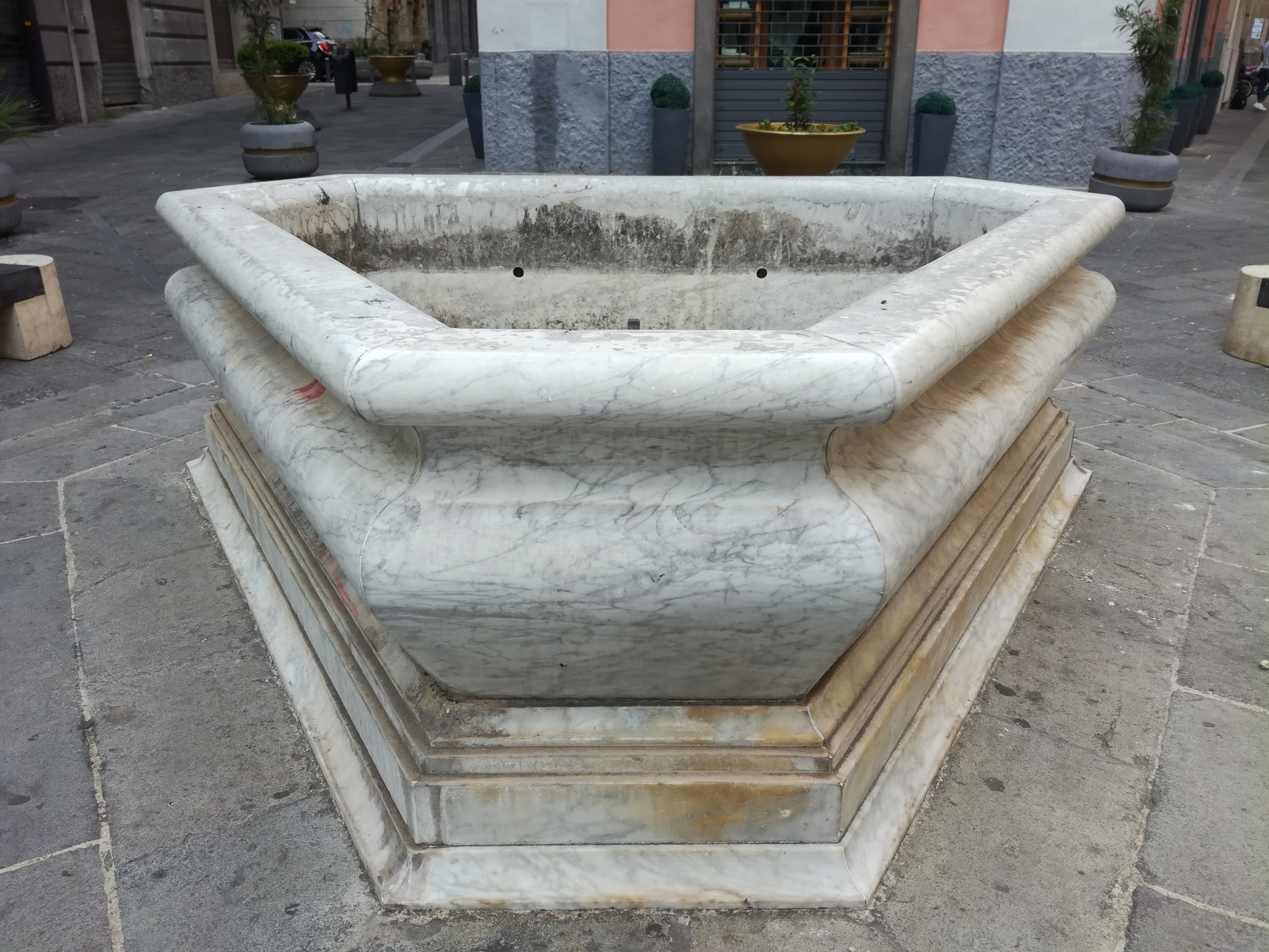 Fontana Pesce